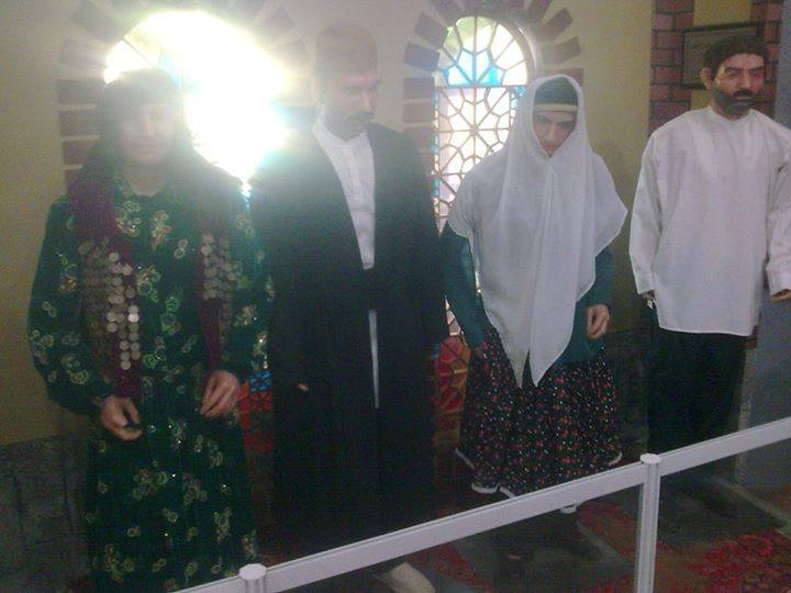 تۆرکجه: سونقور منطقه سینده اولان گئییملر ساغ الدن 2 نفر سونقور شهرین تورک خالقین کیشی و خانیملی گئییملری سول الده ایکی نفر کلیائی ائلیندن کیشی و خانیملی سونقور اطرافیندا اولان کلیائی ائلین گئییملری